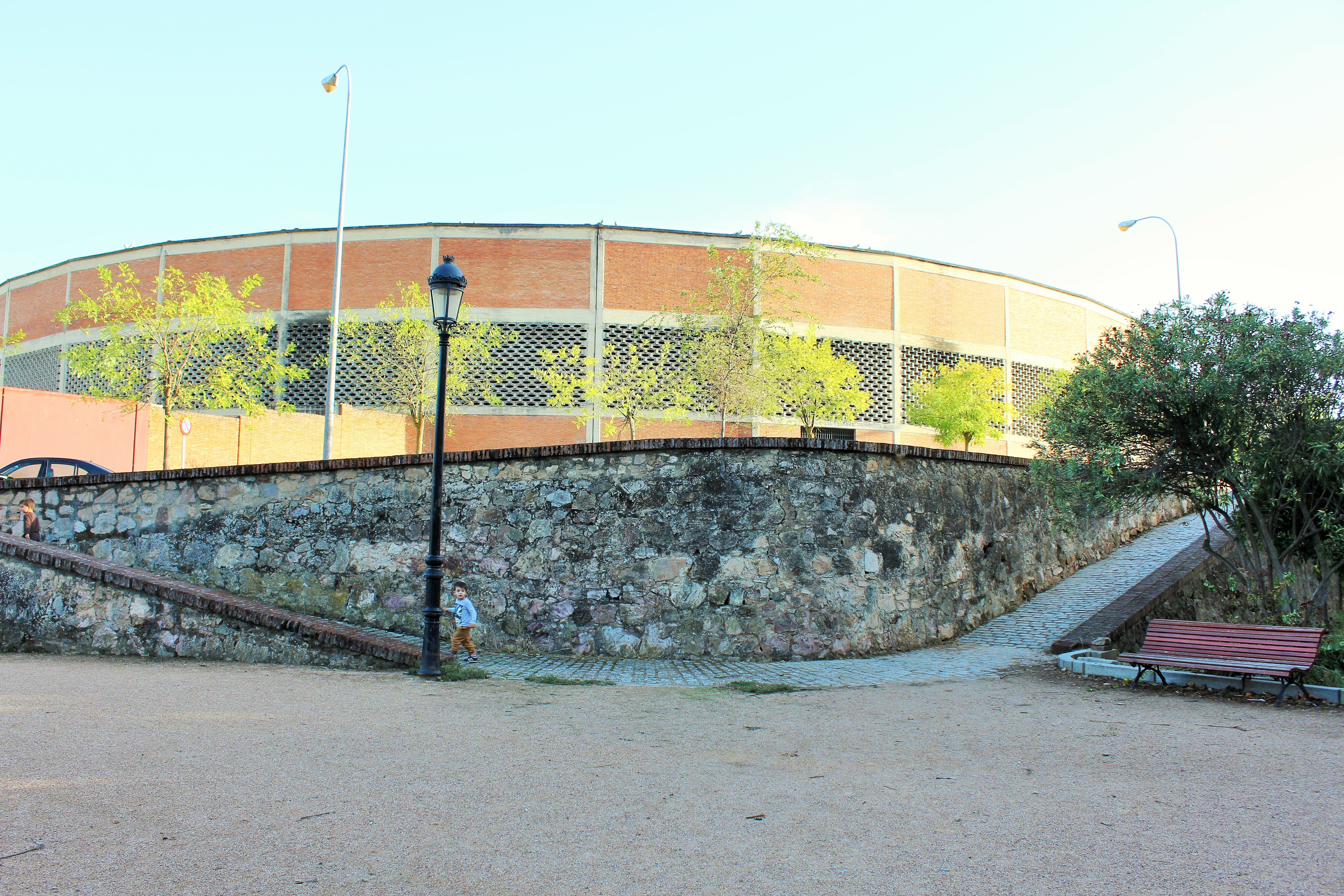 Muralla exterior. Plaza de toros al fondo.